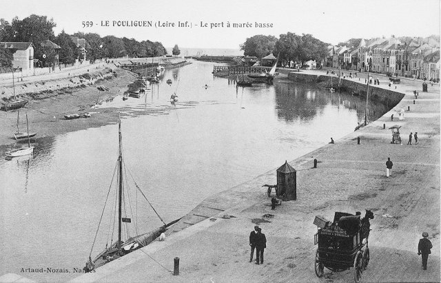 Le Pouliguen (Loire-Atlantique - France) : le port à marée basse